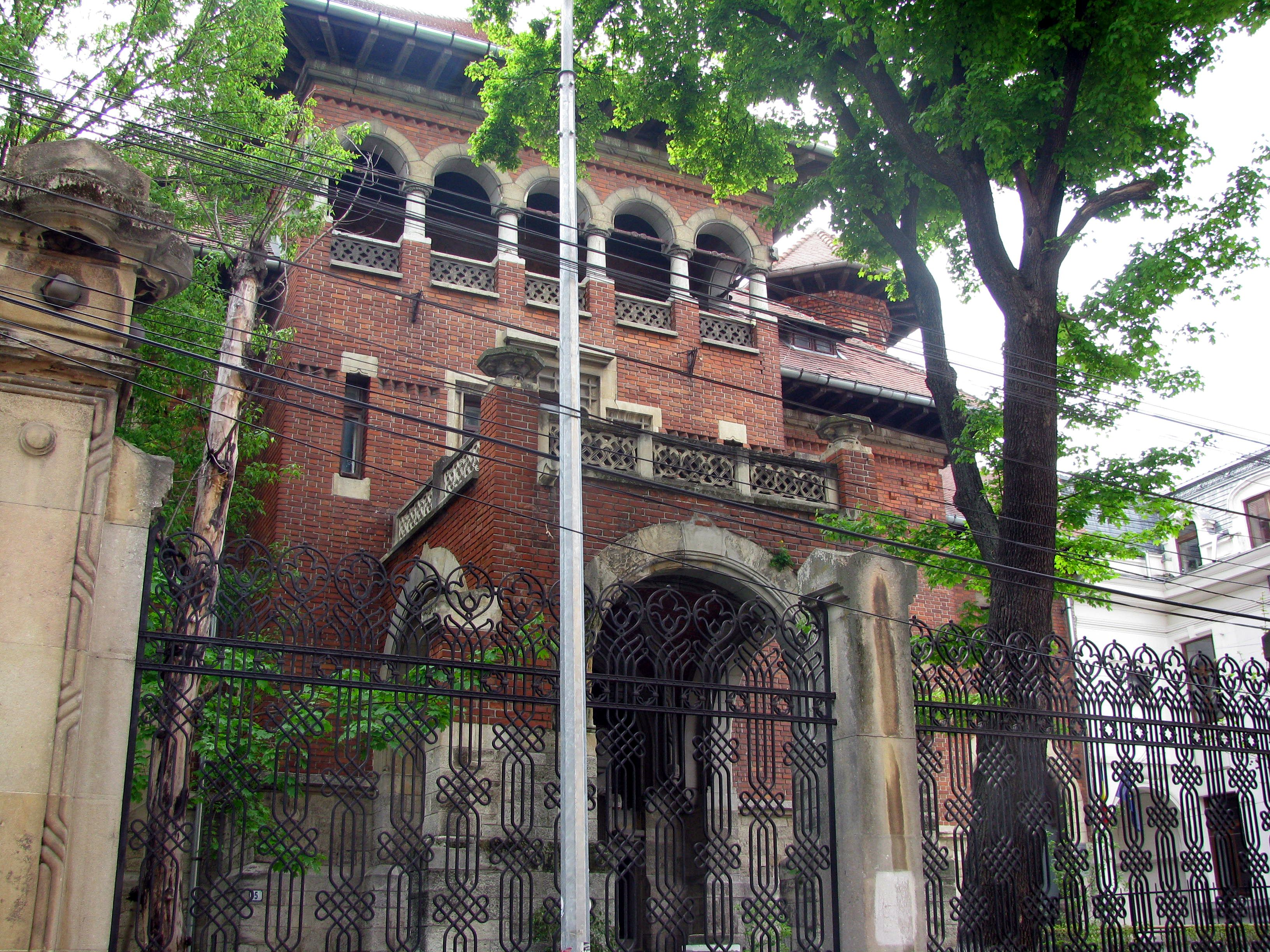 Casa Radu Rosetti (general de divizie, istoric militar, academician şi ministru al Educaţiei Naţionale), str. Mihail Moxa nr. 3-5, București, arhitect Nicolae Ghika Budeşti. În prezent etajul este ocupat de clubul sportiv Sportul Studenţesc